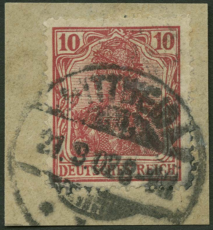 Sogenannte "Chemnitzer Postfälschung", echte Abstempelung. Hergestellt 1902 von den Fälschern Schulz und Meerstein.